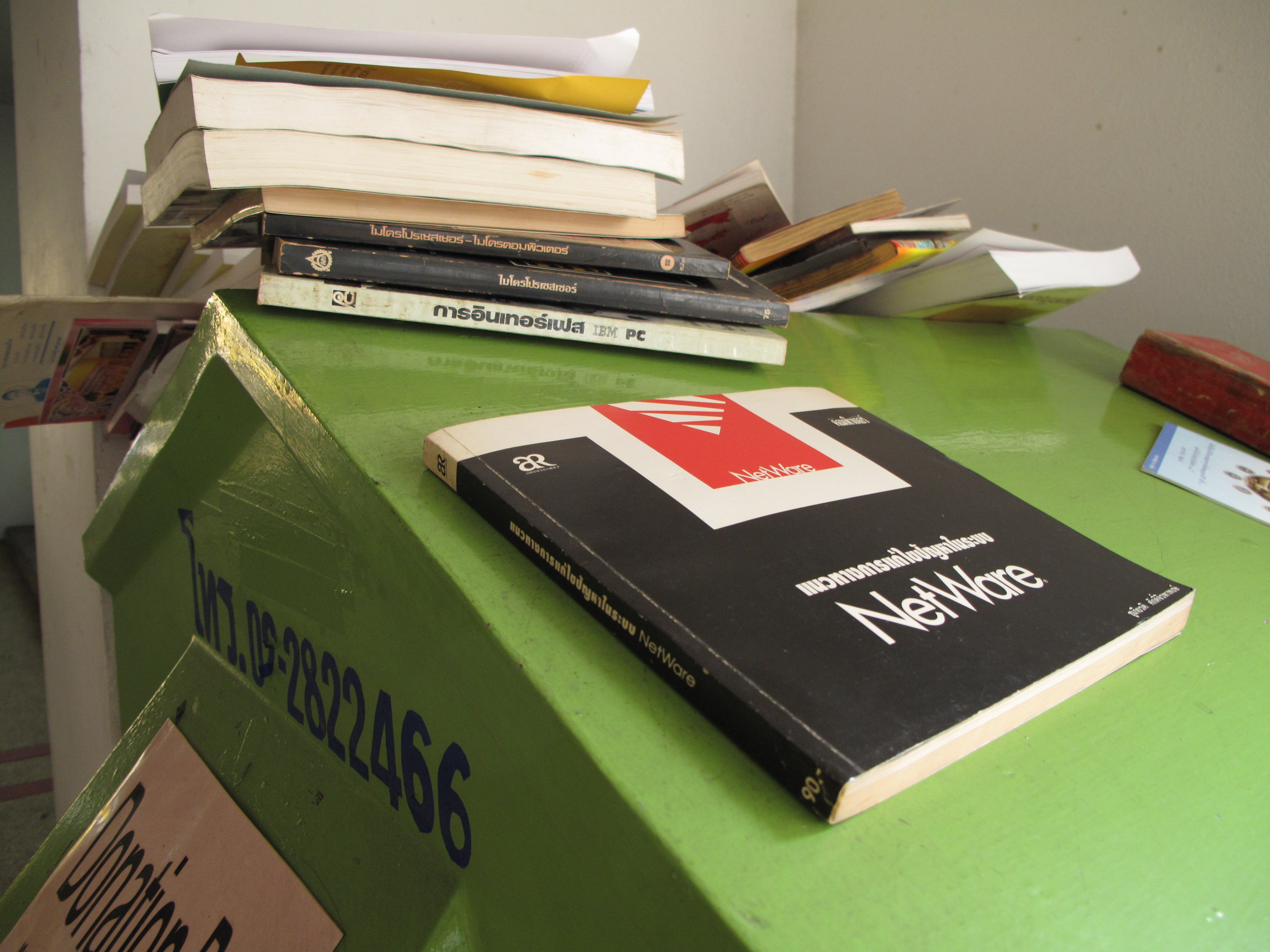 บริจาคหนังสือ NetWare! บนตู้รับบริจาคหนังสือ ธรรมศาสตร์ ท่าพระจันทร์